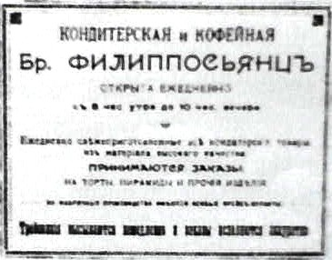 Փիլիպոսյան եղբայրներ շոկոլադե ձեռնարկության արտադրանքի պիտակ